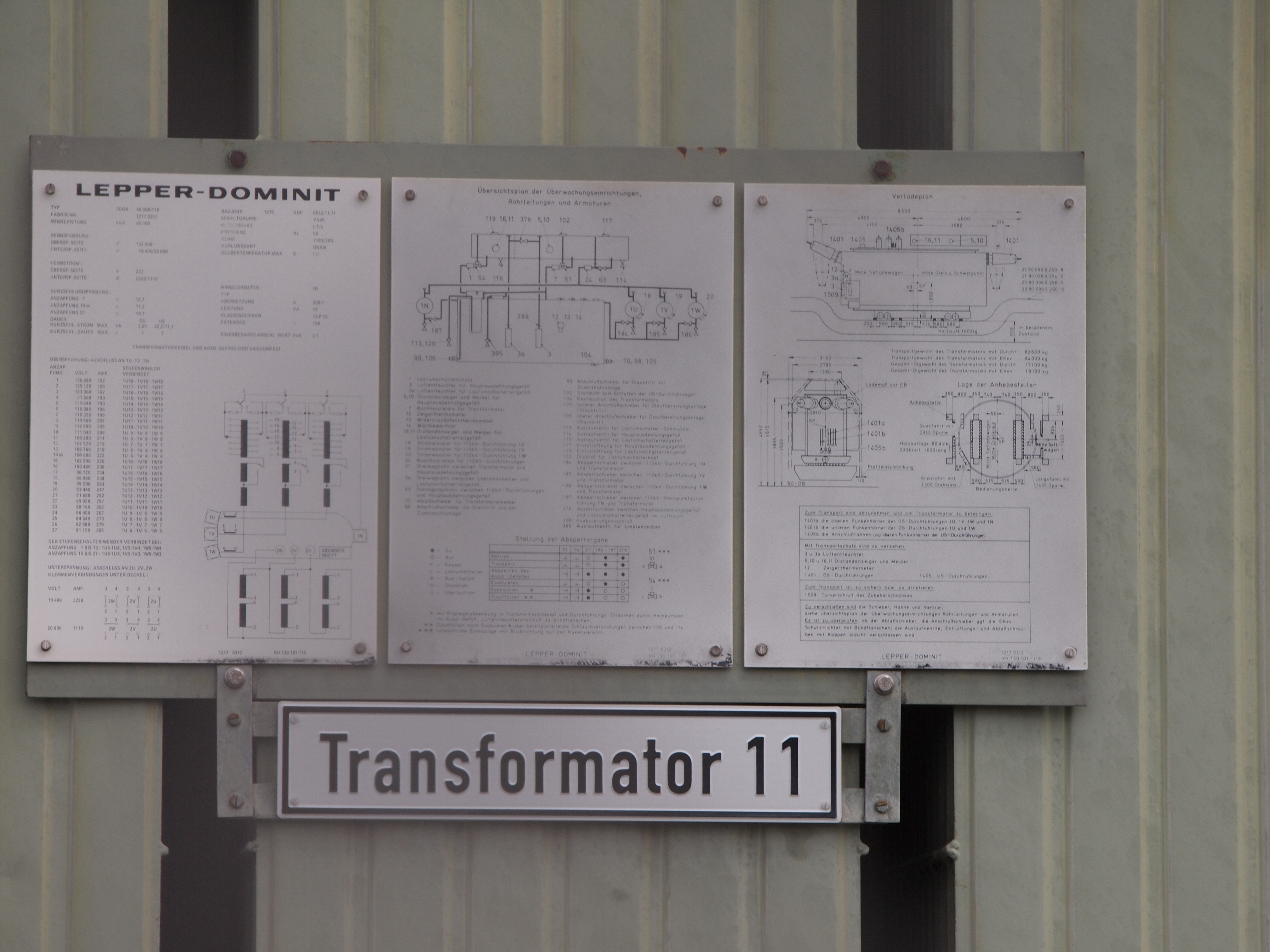 Schemabild und Beschilderung von Transformator 11 im Umspannwerk Nr. 730 in Leinau, Gemeinde Pforzen (Lepper Dominit, Bj. 1978) der VWEW im Umspannwerk Nr. 730 bei Leinau. Das Umspannwerk ist eines von zwei Umspannwerken, welche die Stadt Kaufbeuren mit Strom versorgen. Trafo Nr. 11: Lepper Dominit, Baujahr 1978, 40 MVA, 110kV auf (10kV oder 20kV)